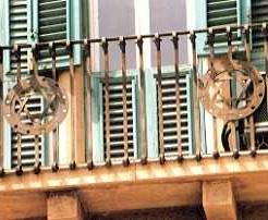 Messina Palace Cerruti Bisazza detail